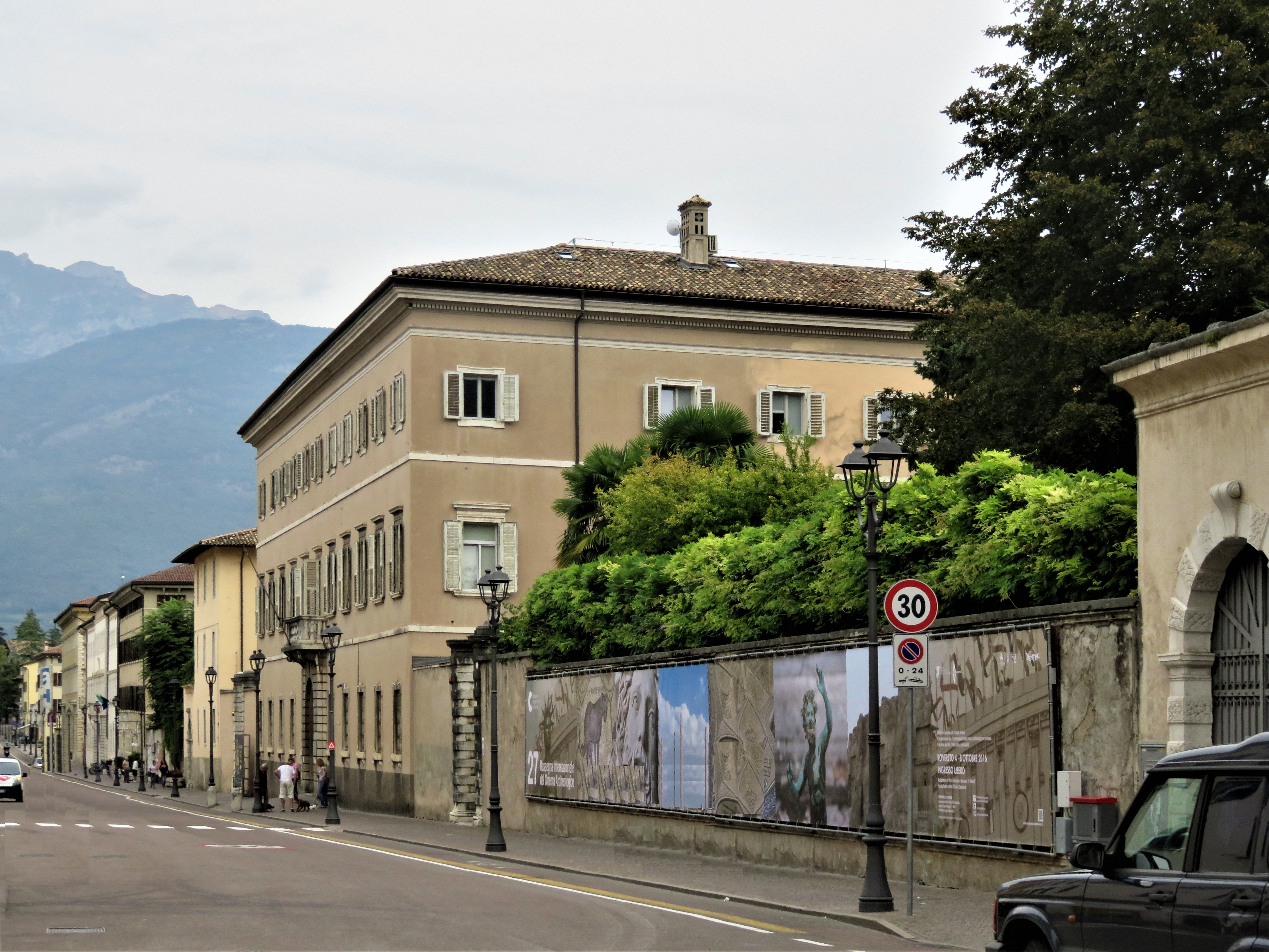 Palazzo Fedrigotti con vista su corso Bettini. Sullo sfondo Palazzo Alberti Poja e zona di accesso al Mart